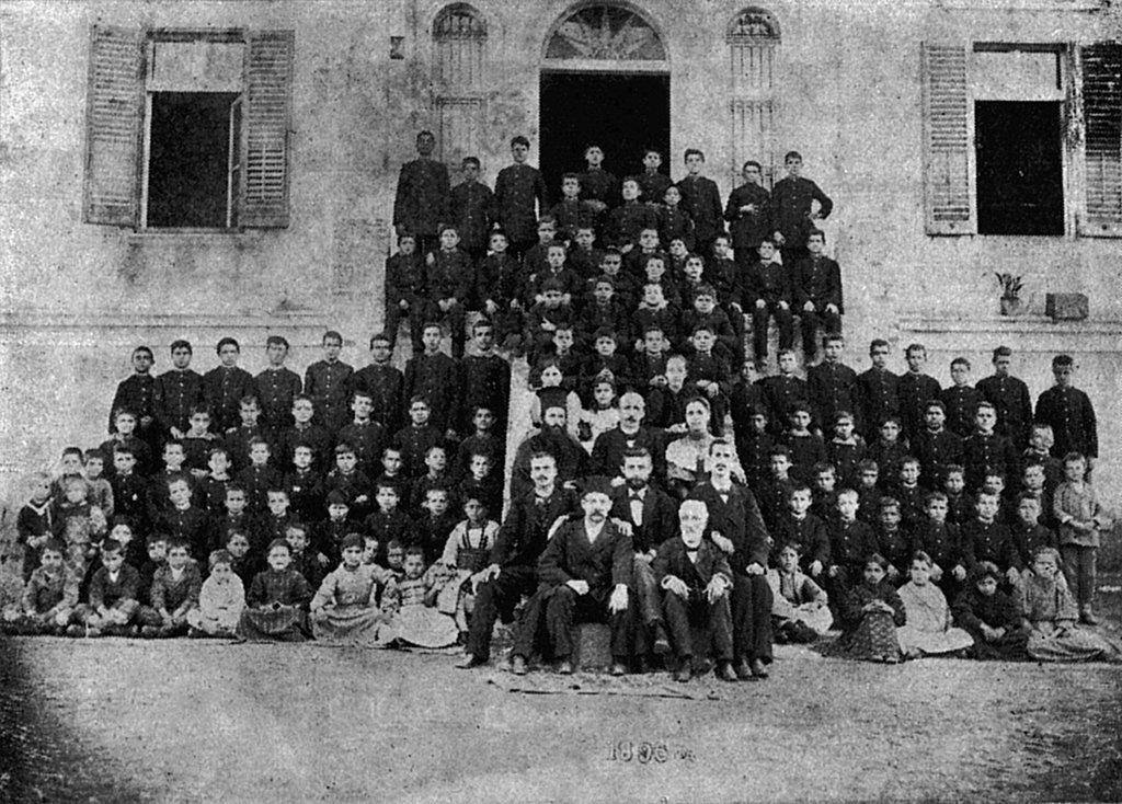 Srpski (latinica): Učenici i nastavnici Srpske gimnazije Dom nauke u Solunu 1896-1897